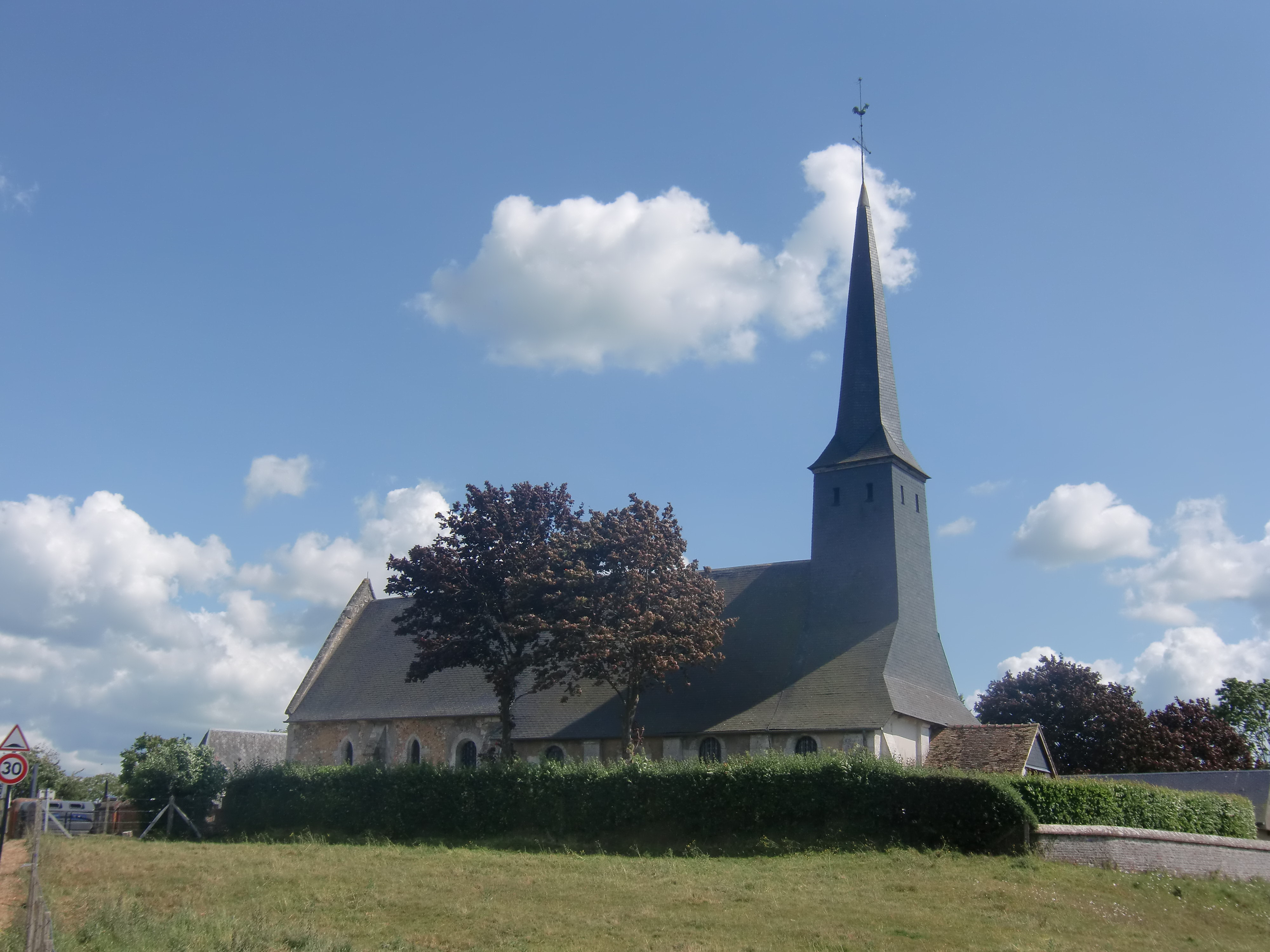 Église de la Sainte-Trinité à Bosc-Bénard-Crescy (Eure, Normandie, France)